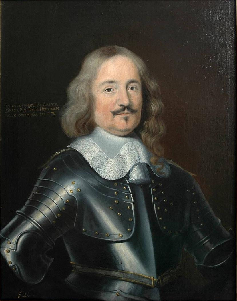 Brustbild von Herzog Ludwig Philipp von Pfalz-Simmern, Pfalzgraf bei Rhein (geb. 23. November 1602 in Heidelberg; gest. 8. Januar 1655 in Crossen).